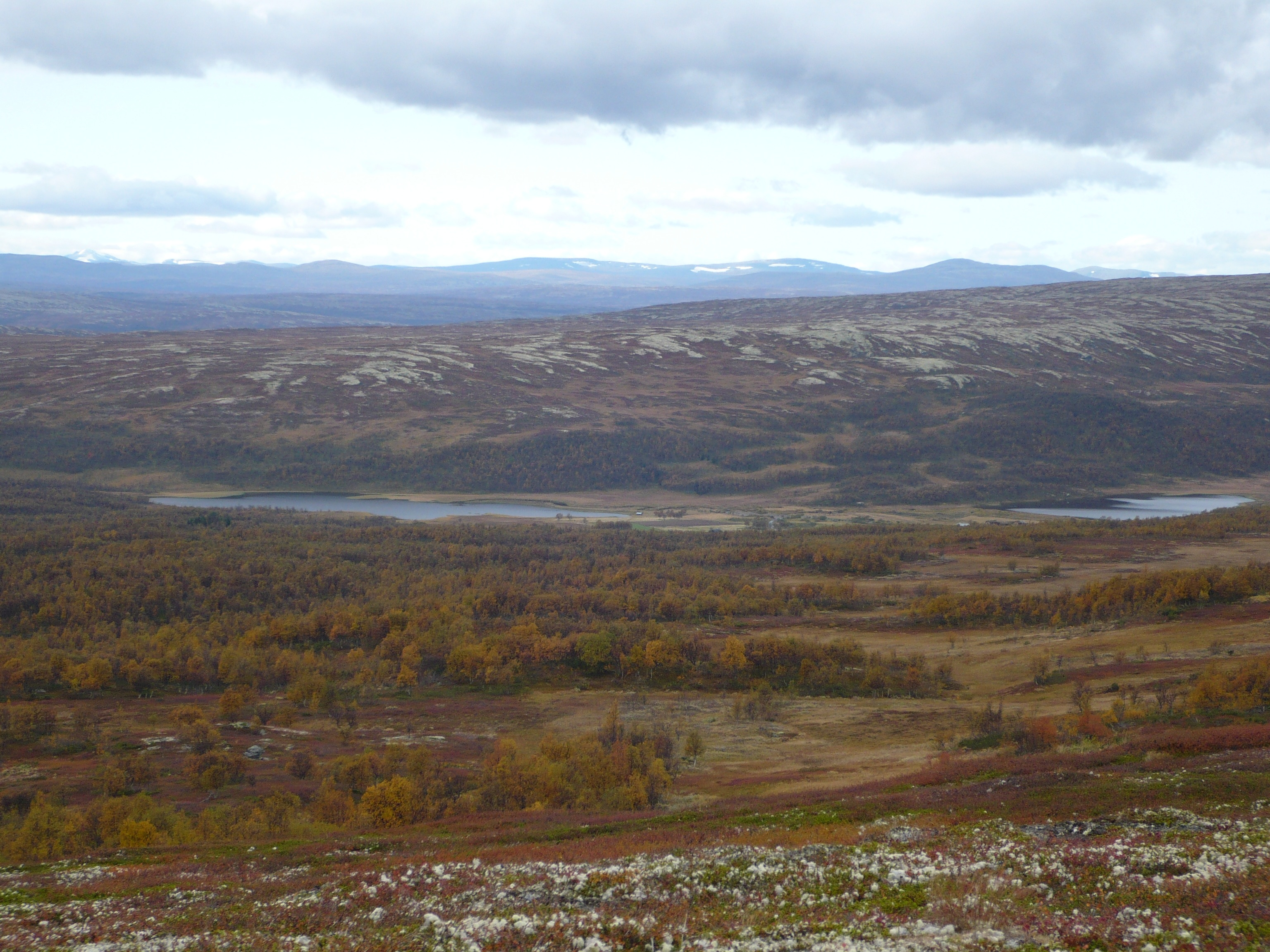 Søndre og Nordre Magnillsjøan, Magnillsetran